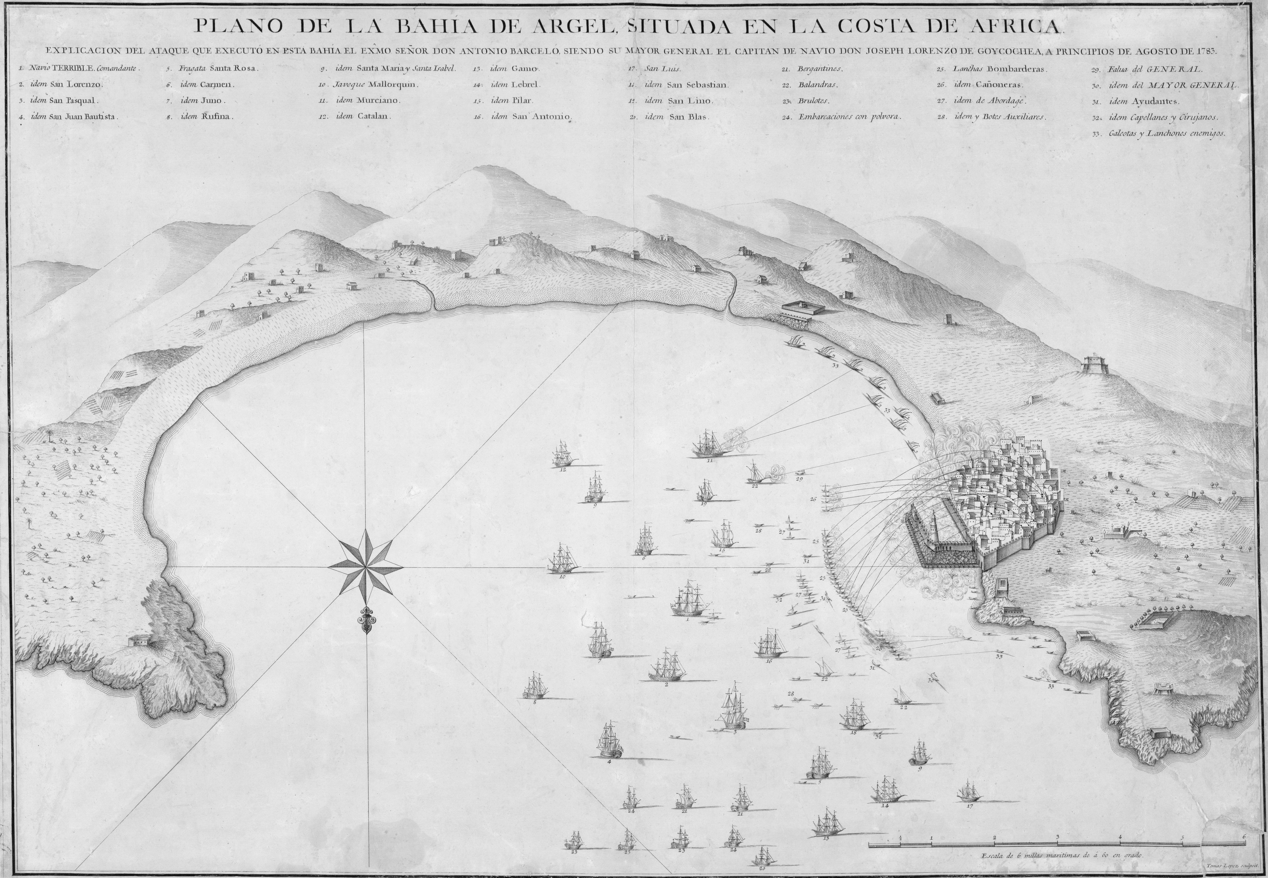 Plano de la bahía de Argel, situada en la costa de África: Explicación del ataque que executó en esta Bahía el Exmo. Señor Don Antonio Barceló, siendo su Mayor General el Capitán de Navío Don Joseph Lorenzo de Goycoechea, a principios de agosto de 1783. Grabado por D. Tomas Lopez, Geógrafo del Rey. Madrid 1783.